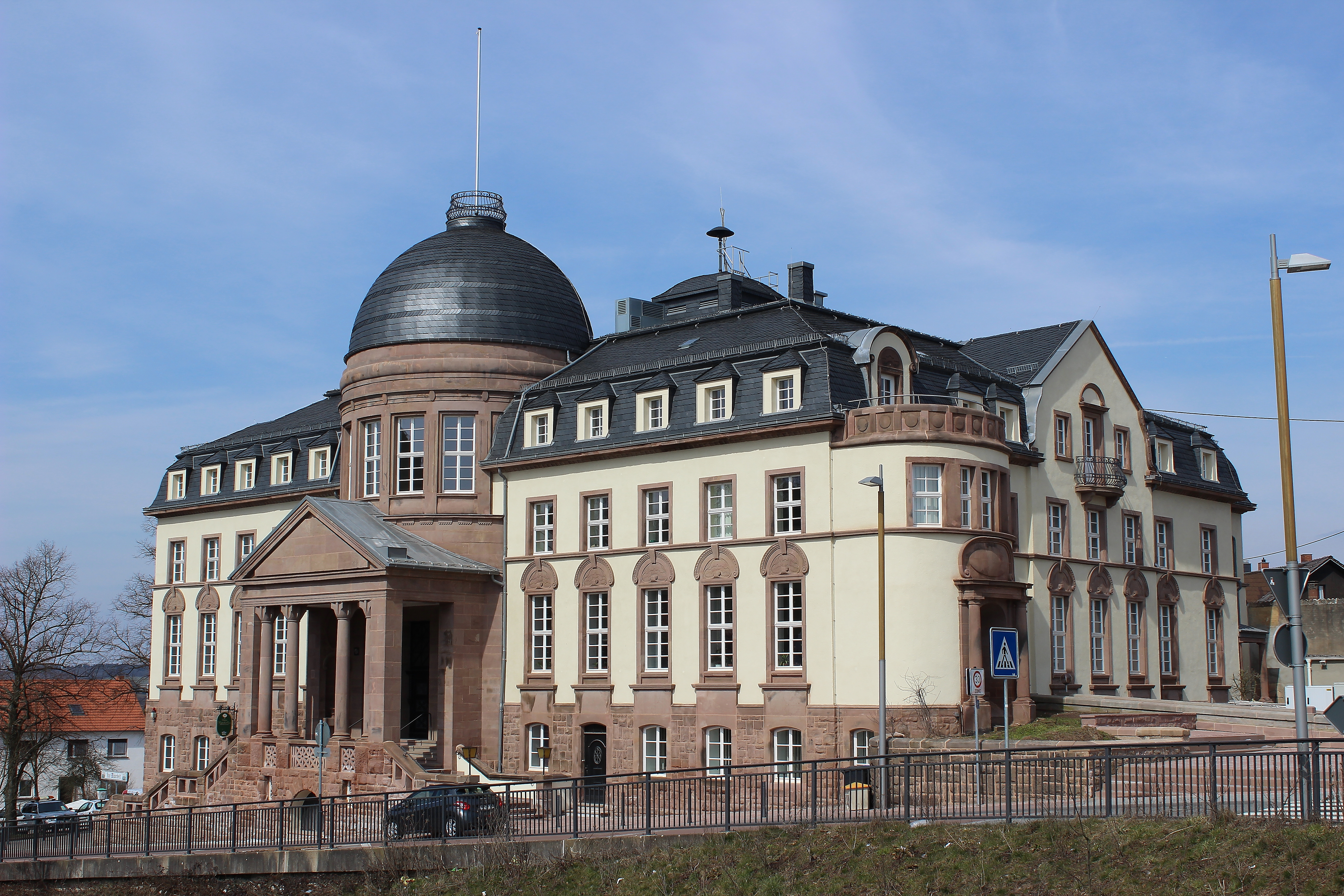 Rathaus Wemmetsweiler, Saarland